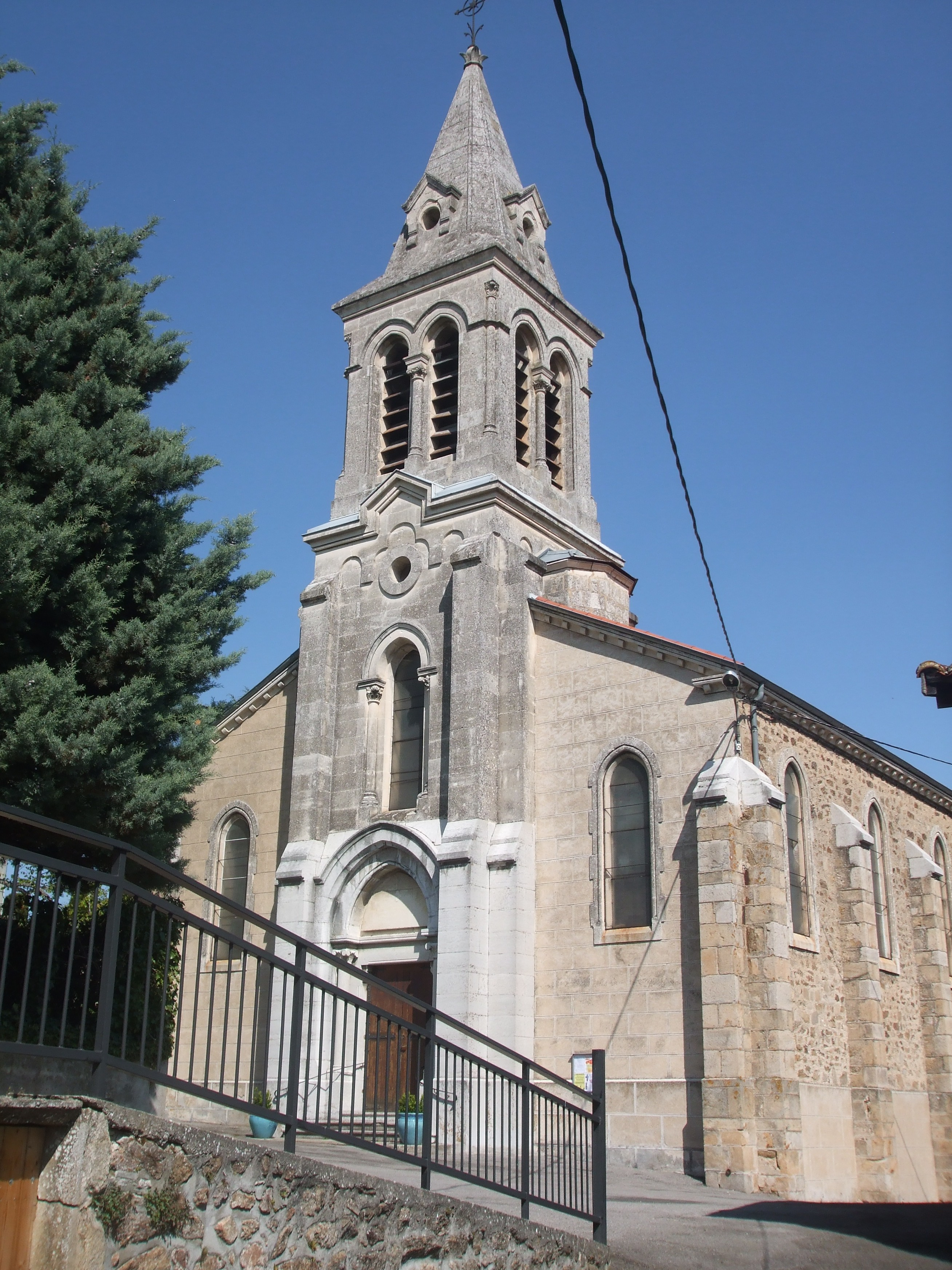 église Saint Pierre